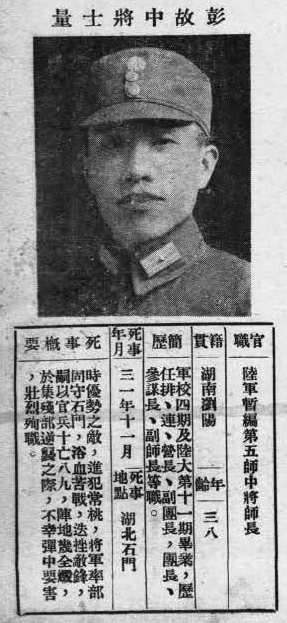 中文（台灣）: 抗戰軍人忠烈錄第一輯中的烈士遺像